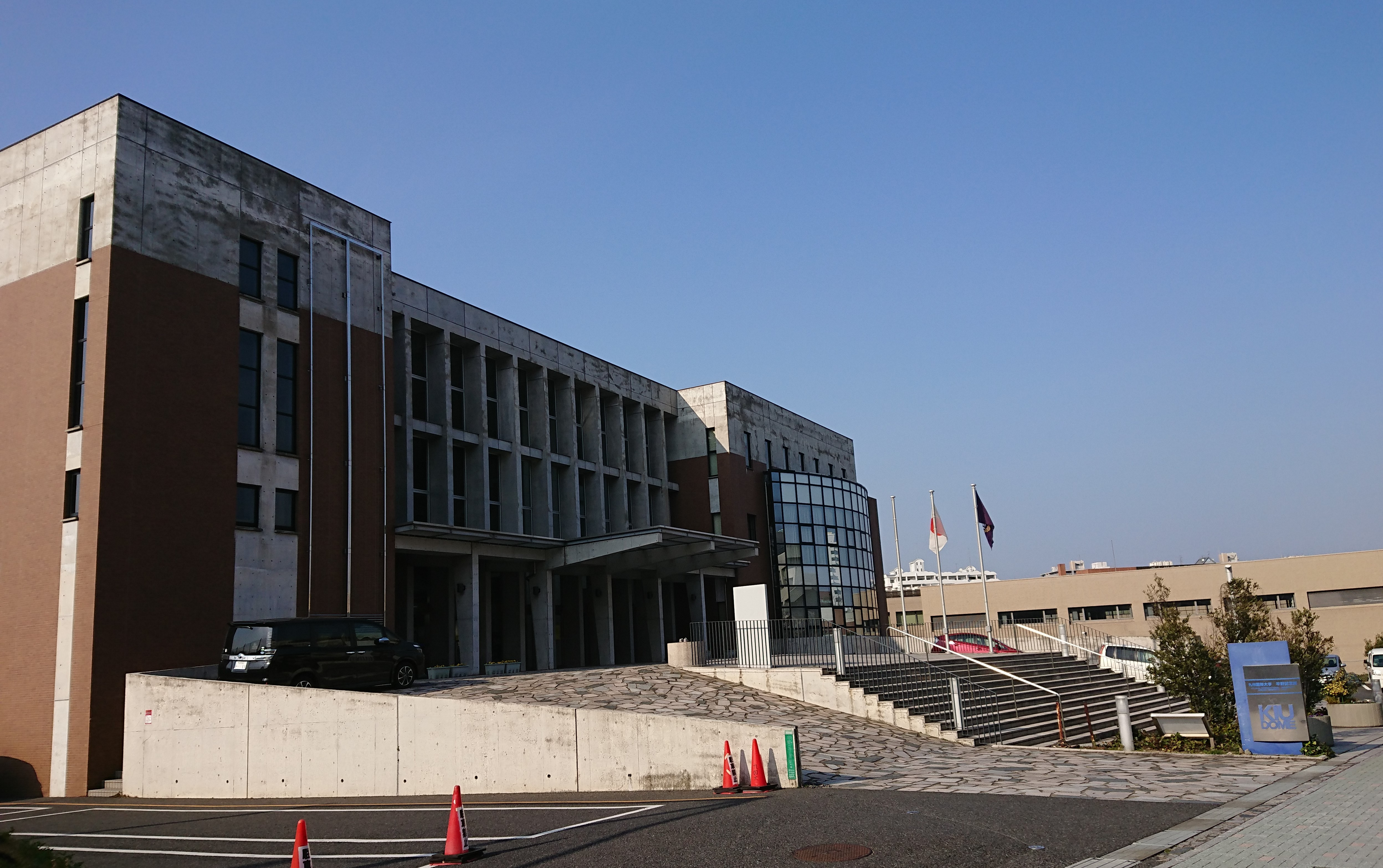 KIUドーム（平野記念館）2019年2月26日撮影